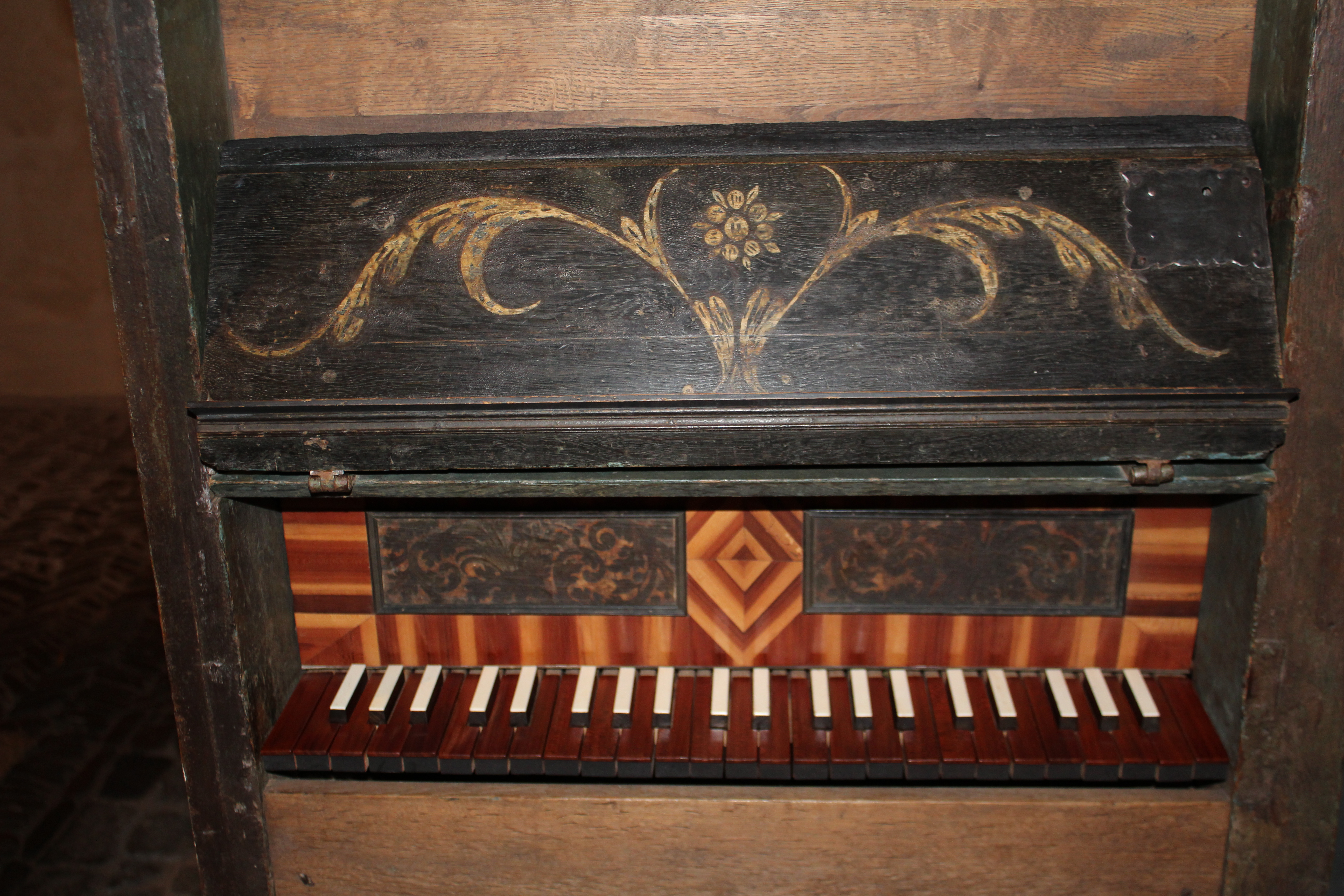 Orgel in der Emmauskapelle Hatzfeld